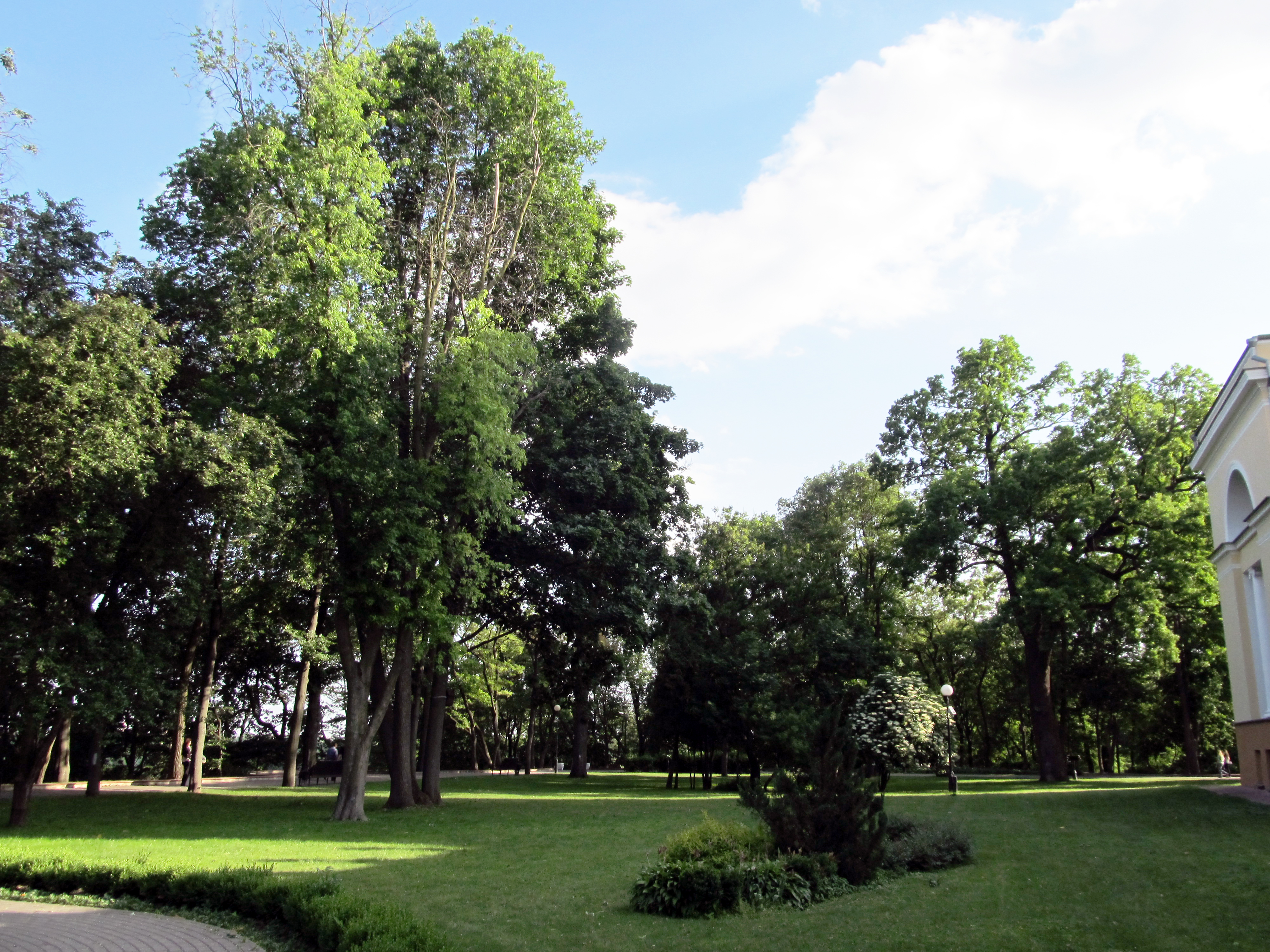 Беларуская (тарашкевіца): Палацава-паркавы ансамбаль: палац, дэкаратыўнае аздабленьне інтэр’ера вежы і цэнтральнай залі палаца, Петрапаўлаўскі сабор, капліца-пахавальня,парк. г. Гомель This is a photo of Belarusian heritage monument. Reference number: 310Г000044 ( WLM)